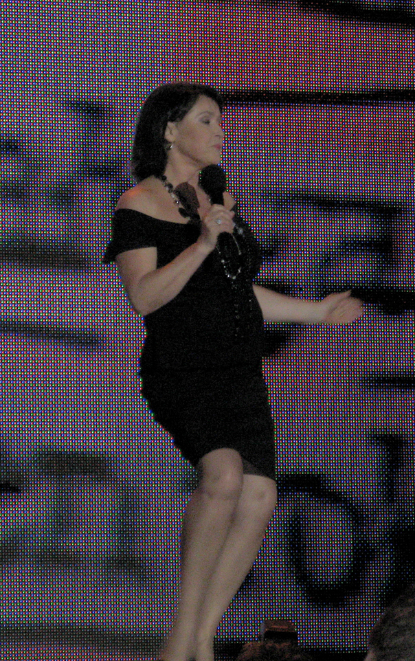 Elzbieta Jaworowicz - koncert Przebojowa Jedynka (TVP1 (2 września 2007 - scena przed siedzibą TVP na Woronicza w Warszawie